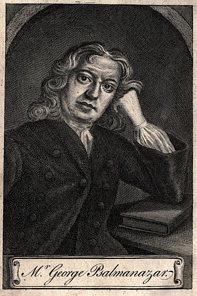 George Psalmanazar (1679?-1763) est un imposteur qui a prétendu être le premier Formosan à visiter l'Europe.